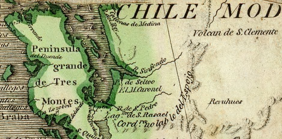 Río Sinfondo (span: Tiefer Fluss), heute Río Aisén und Umgebung im 18. Jahrhundert. Ausschnitt aus der Südamerikakarte von Juan de la Cruz Cano y Olmedilla.